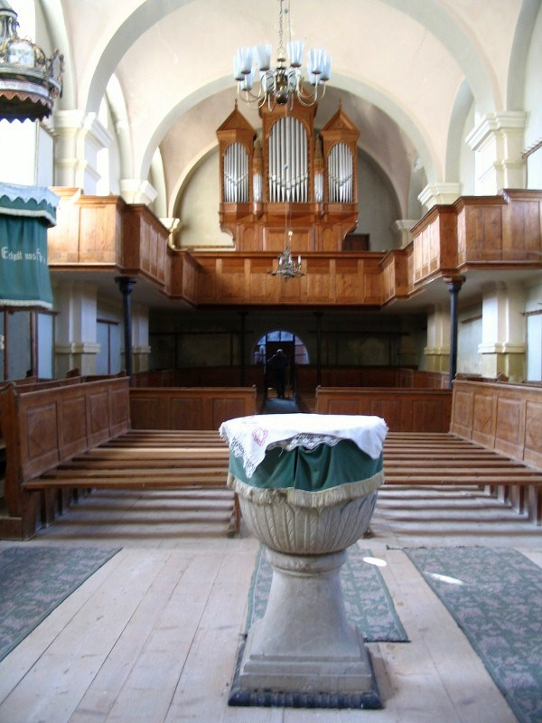 Taufbecken und Empore der Kirchenburg Bekokten